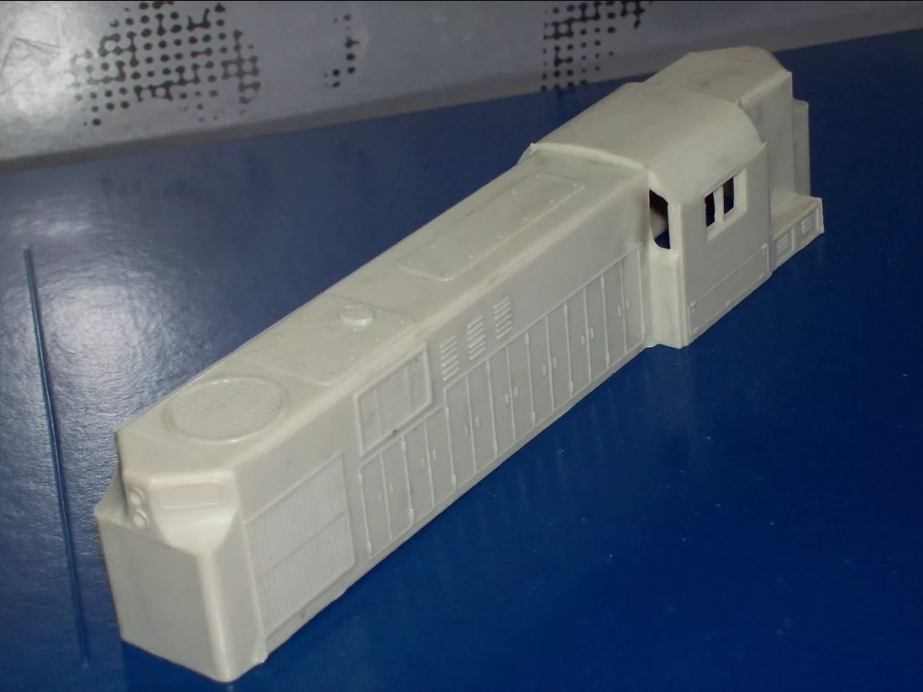 Carroceria de Locomotora Diesel Rs11 marca Szaval.